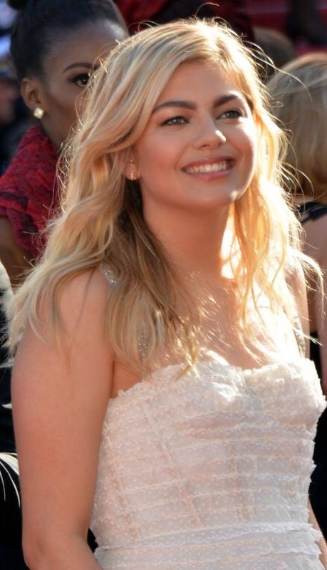 Louane au festival de Cannes